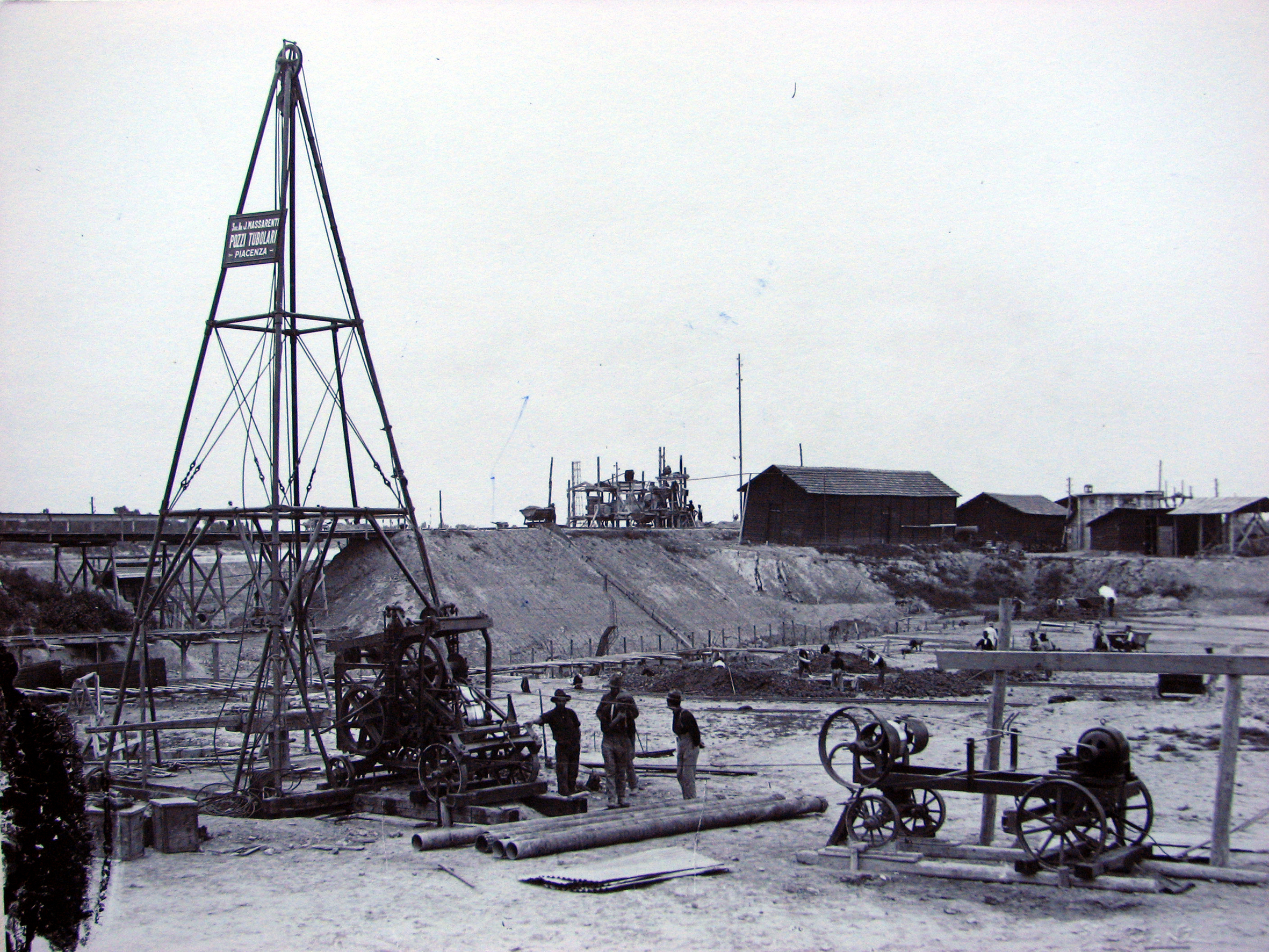 Pozzi tubolari per l'estrazione del petrolio, 1920 (AS Piacenza, Fondo Associazione degli industriali di Piacenza)